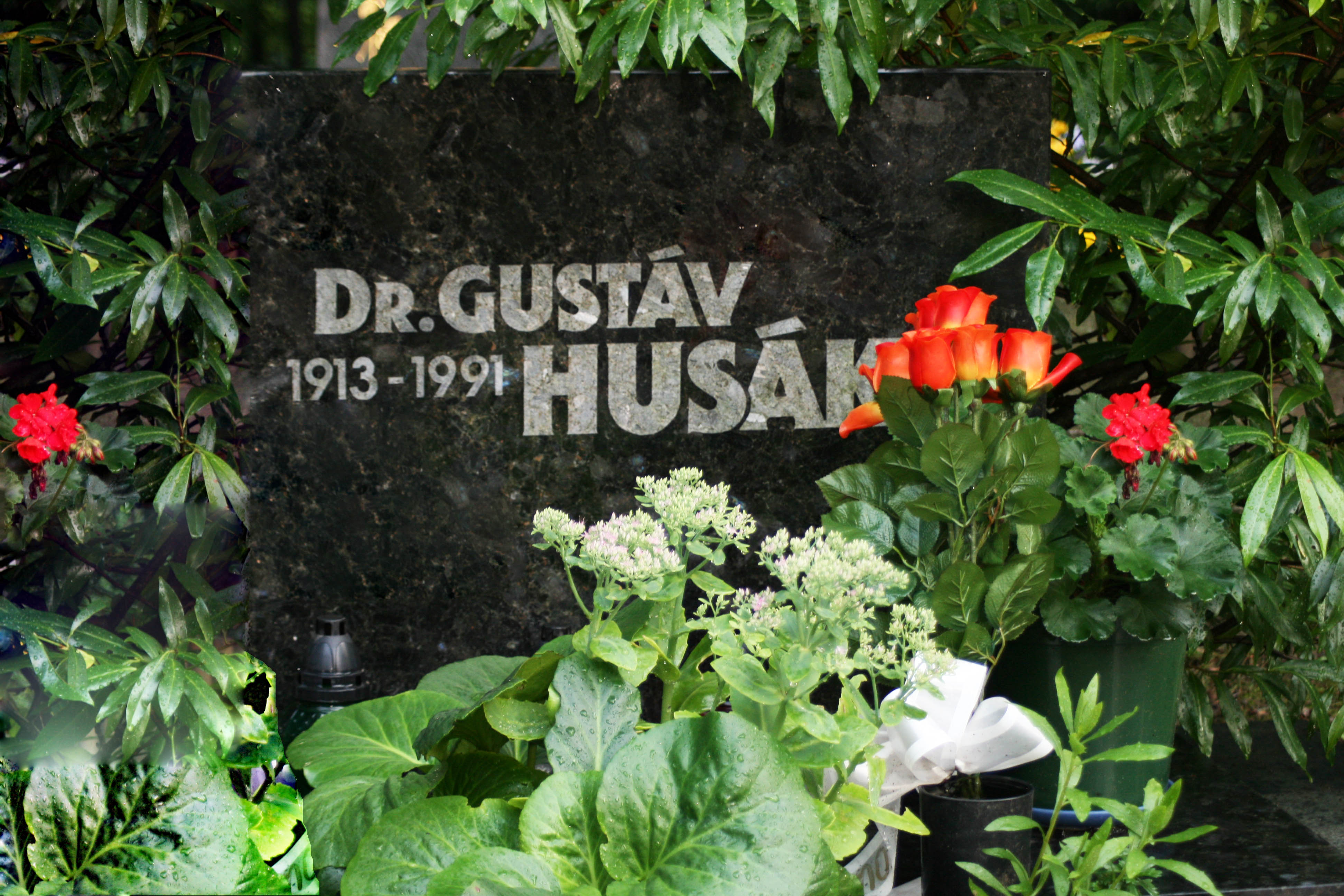 Hrob Gustáva Husáka